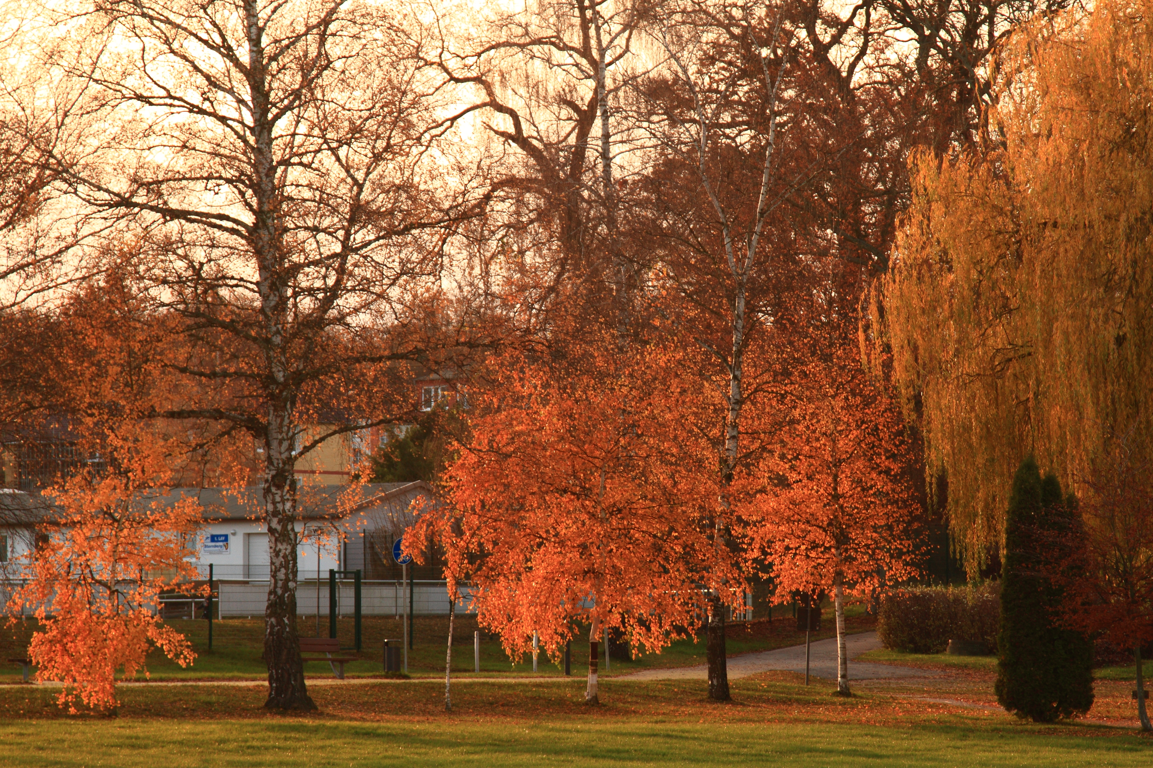 Autumn Glow